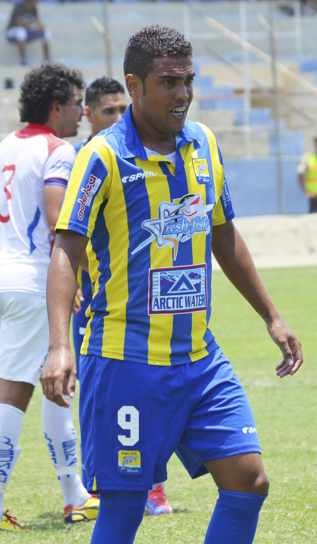 Johnny da Silva en Delfín 2014